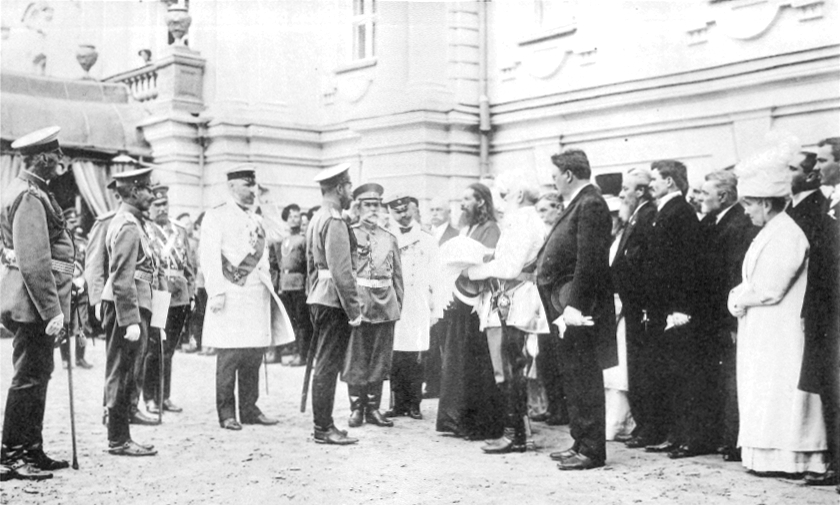 29 августа 1911 года. Депутация от правых организаций г. Киева приветствует императора Николая II. В центре: Столыпин, Николай II, киевский губернатор Гирс (в белом мундире), священник Ф. Синькевич, генерал-майор Жуков и А. И. Савенко.